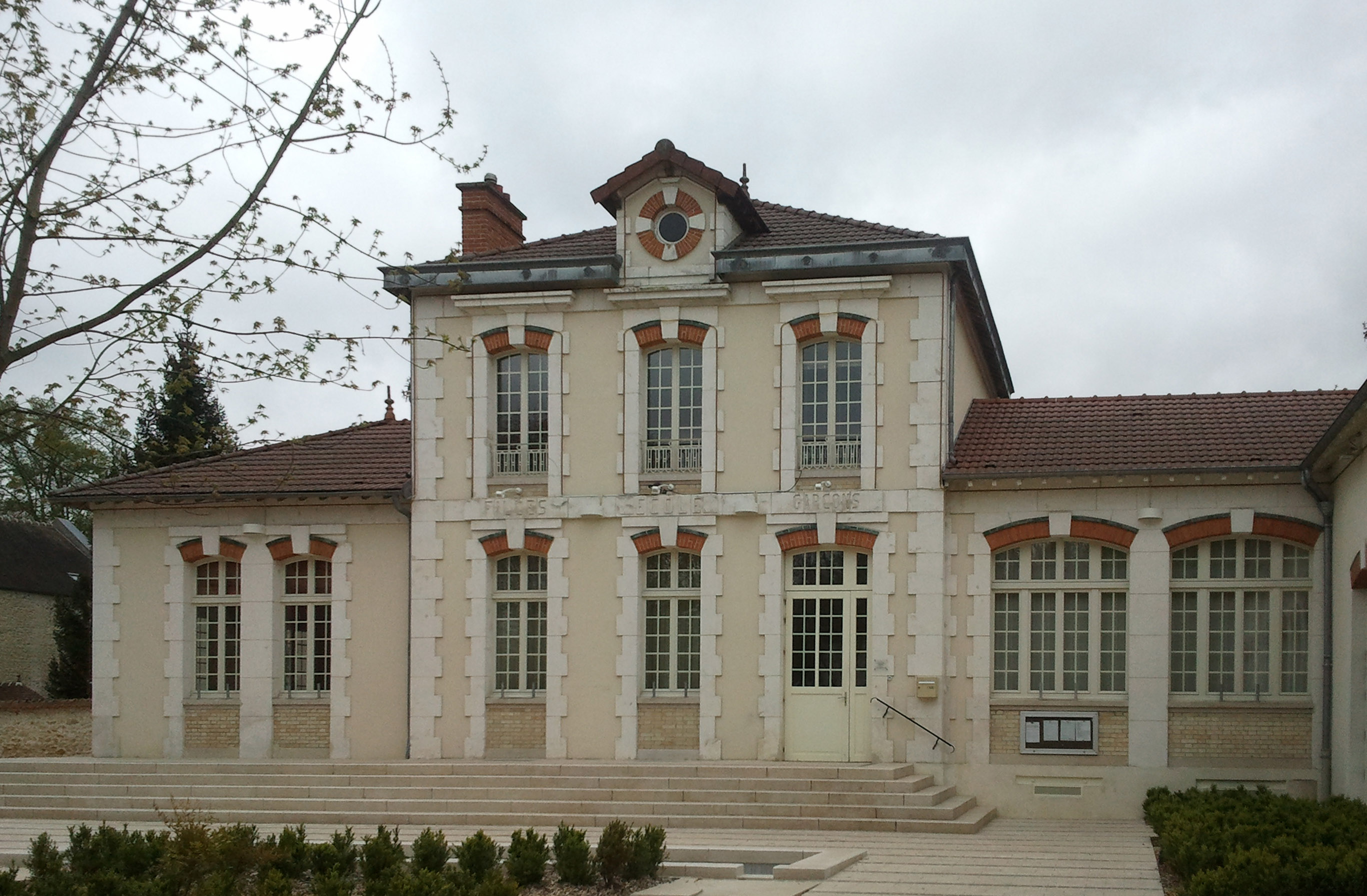 Mairie de Varennes Jarcy, Essonne